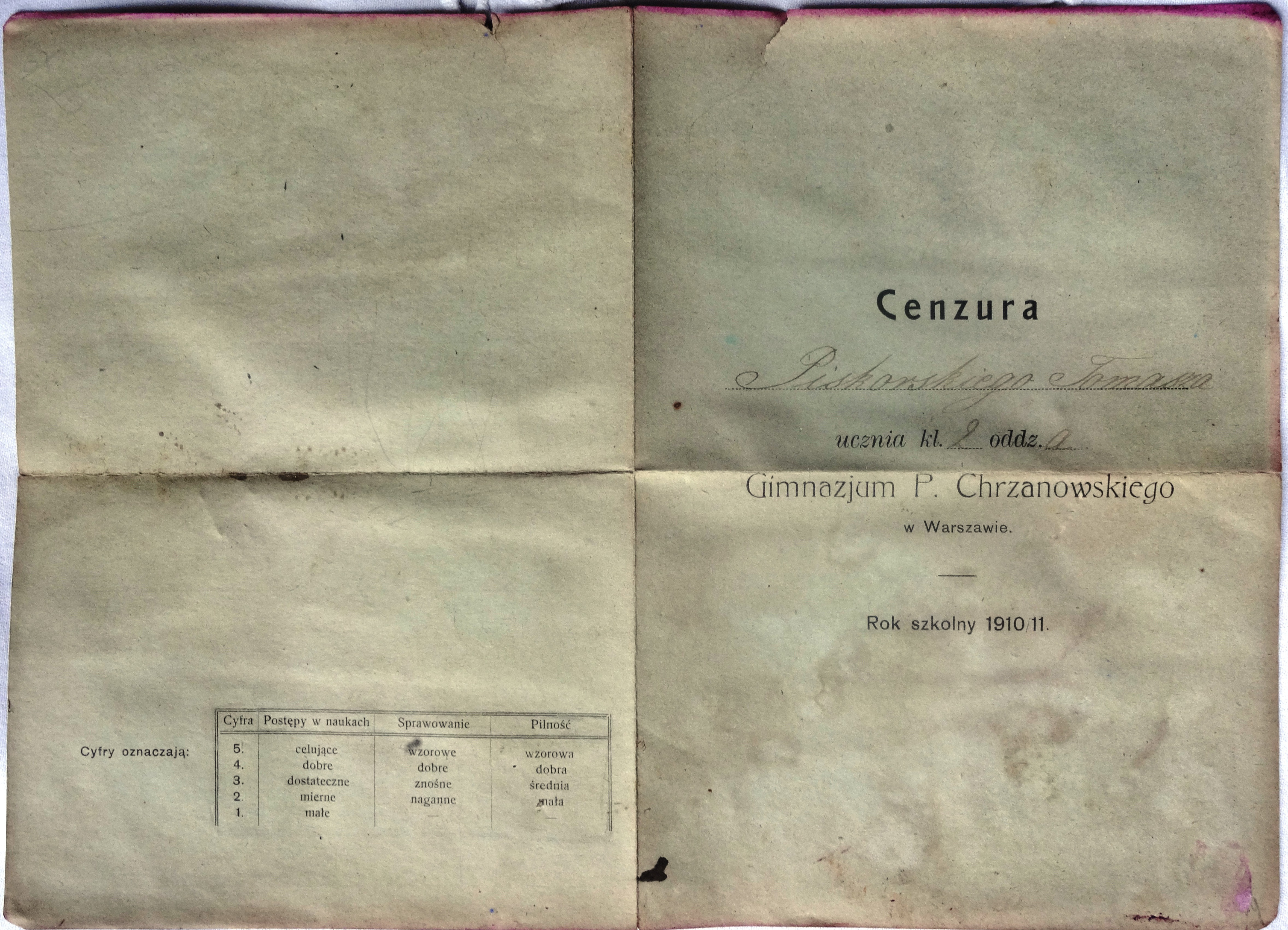 Świadectwo szkolne Tomasza Piskorskiego z II klasy Gimnazjum Pawła Chrzanowskiego